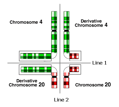 un quadrivalent du à la présence d'une précédente translocation réciproque